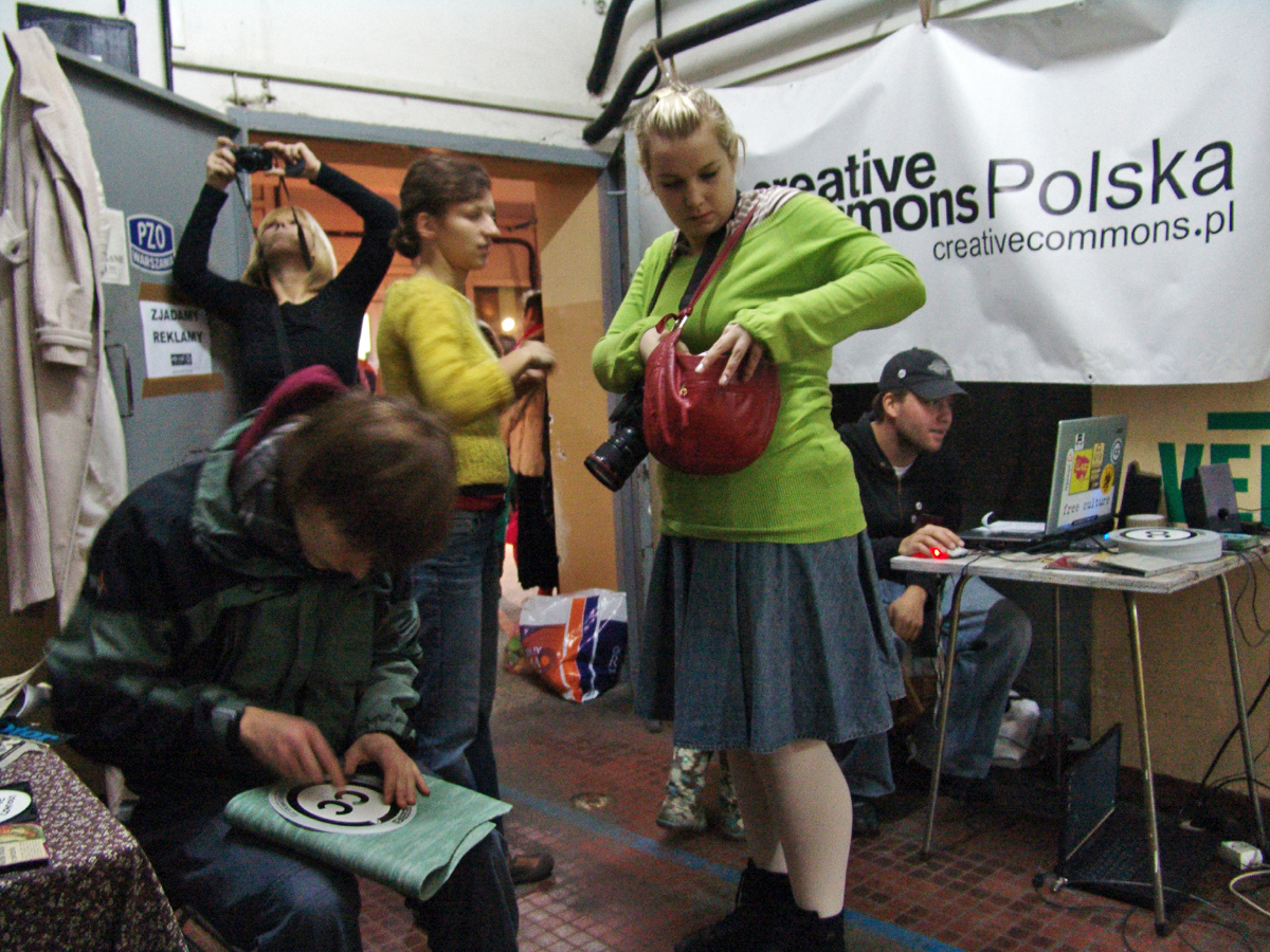 Creative Commons Polska obchodziła czwarte urodziny Creative Commons w ramach imprezy "Przetwory" - targu sztuki z recyklingu i prac młodych designerów w fabryce dawnych Państwowych Zakładów Optycznych (PZO). Na stoisku CC PL rozdawaliśmy prezenty urodzinowe: goście targu mogli za darmo wypalić sobie płytę z muzyką dostępną na licencjach CC, a następnie stworzyć do niej własną okładkę.